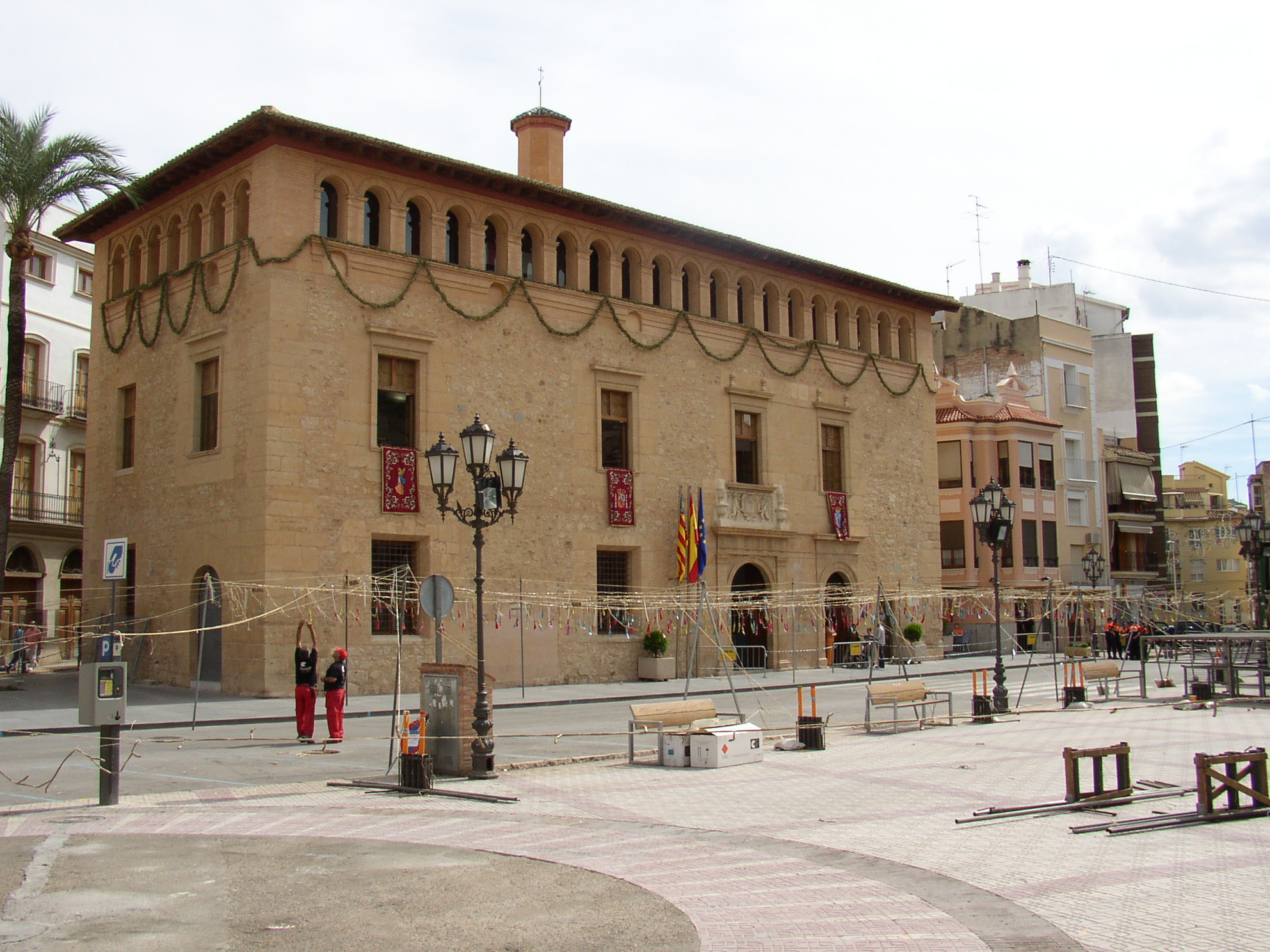 Valencia. (Comunidad Valenciana. España) Liria. Ayuntamiento (Ca la Vila) SigloXVII . Fotografía realizada el 24 septiembre de 2006 por el autor. User:Pelayo2